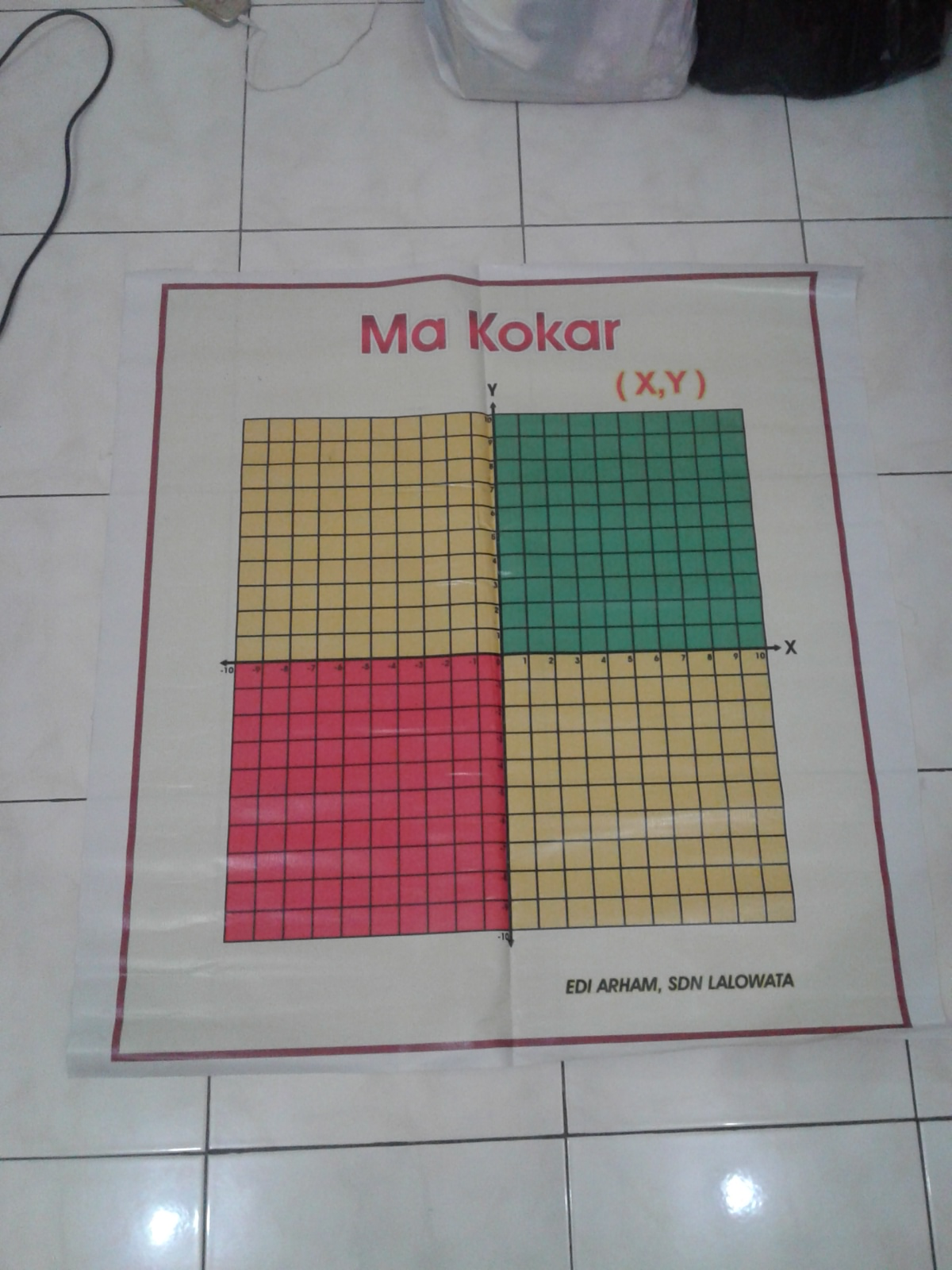 Sebuah media pembelajaran matematika SD